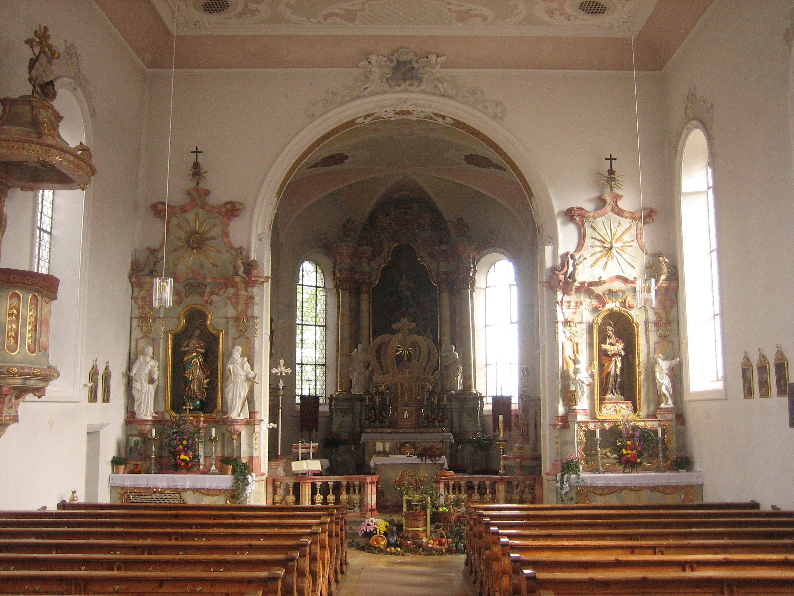 St. Georg, Gemeinde Böhen, Landkreis Unterallgäu, Bayern